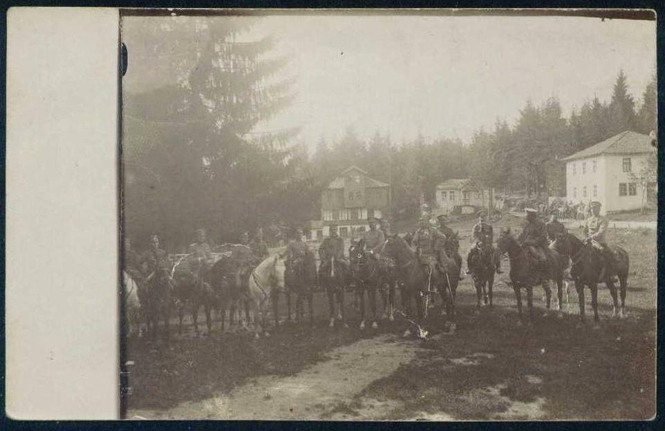 Генерал Стефан Тошев, губернатор на Македония и генерал полковник Атанас Русев през Първата световна война